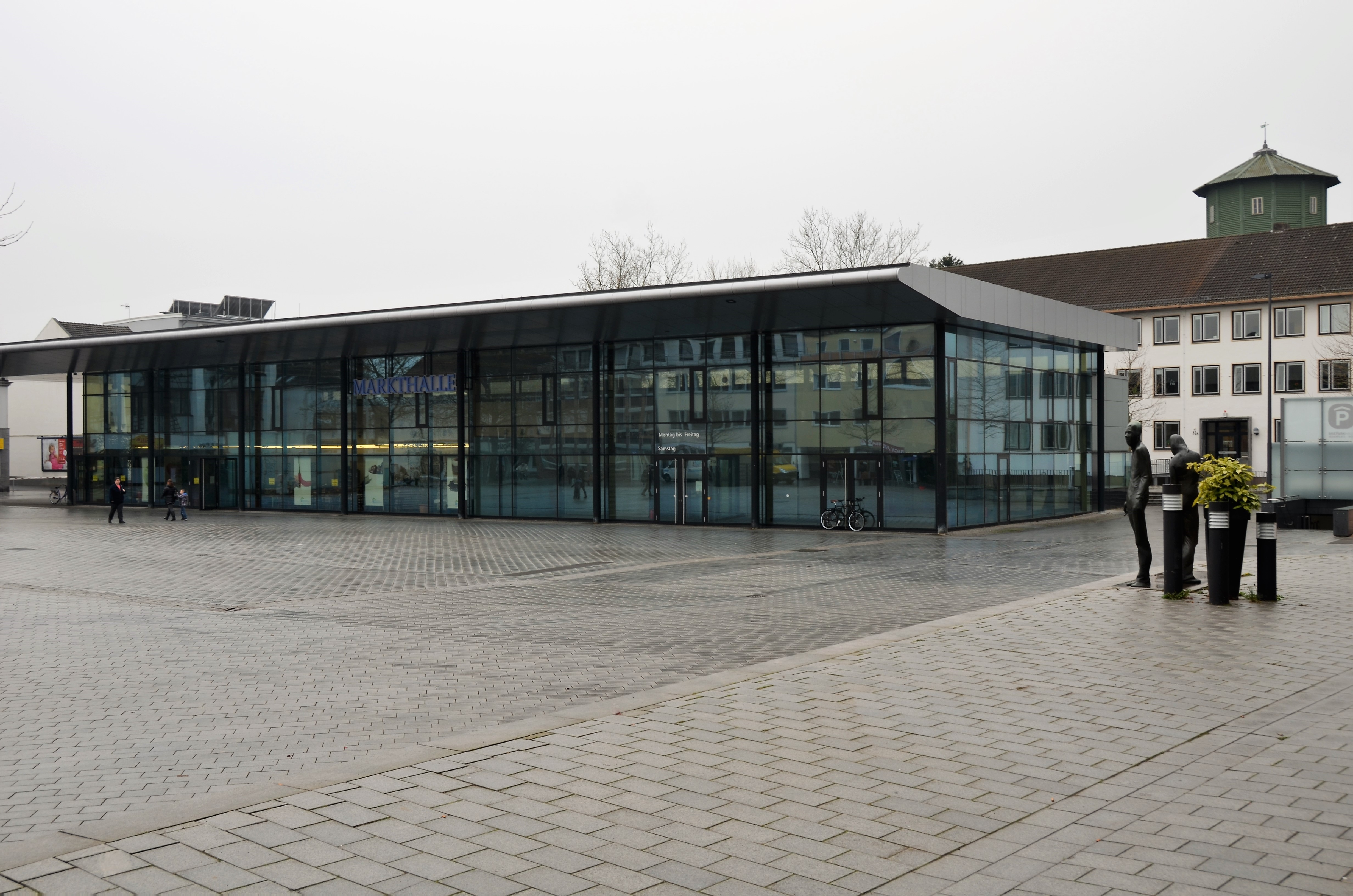 Sedanplatz in Bremen-Vegesack, mit der Vegesacker Markthalle von 2007. Rechts die Figurenskulptur Zu zweit allein von Waldemar Otto von 1986, auf der Terrasse des Gustav-Heinemann-Bürgerhauses.